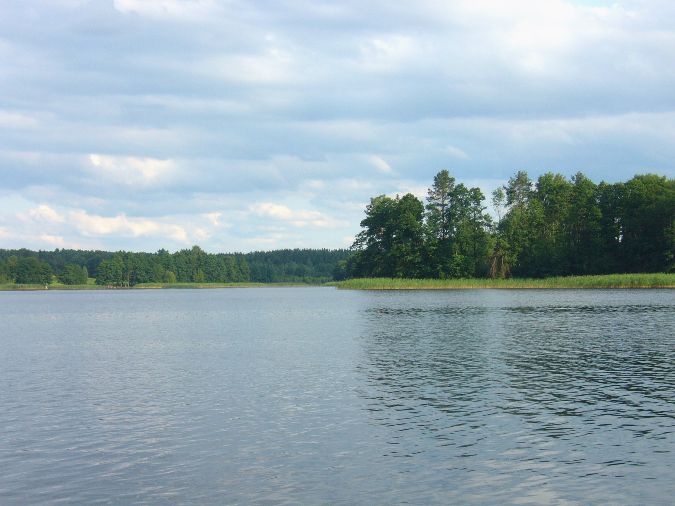 Przesmyk